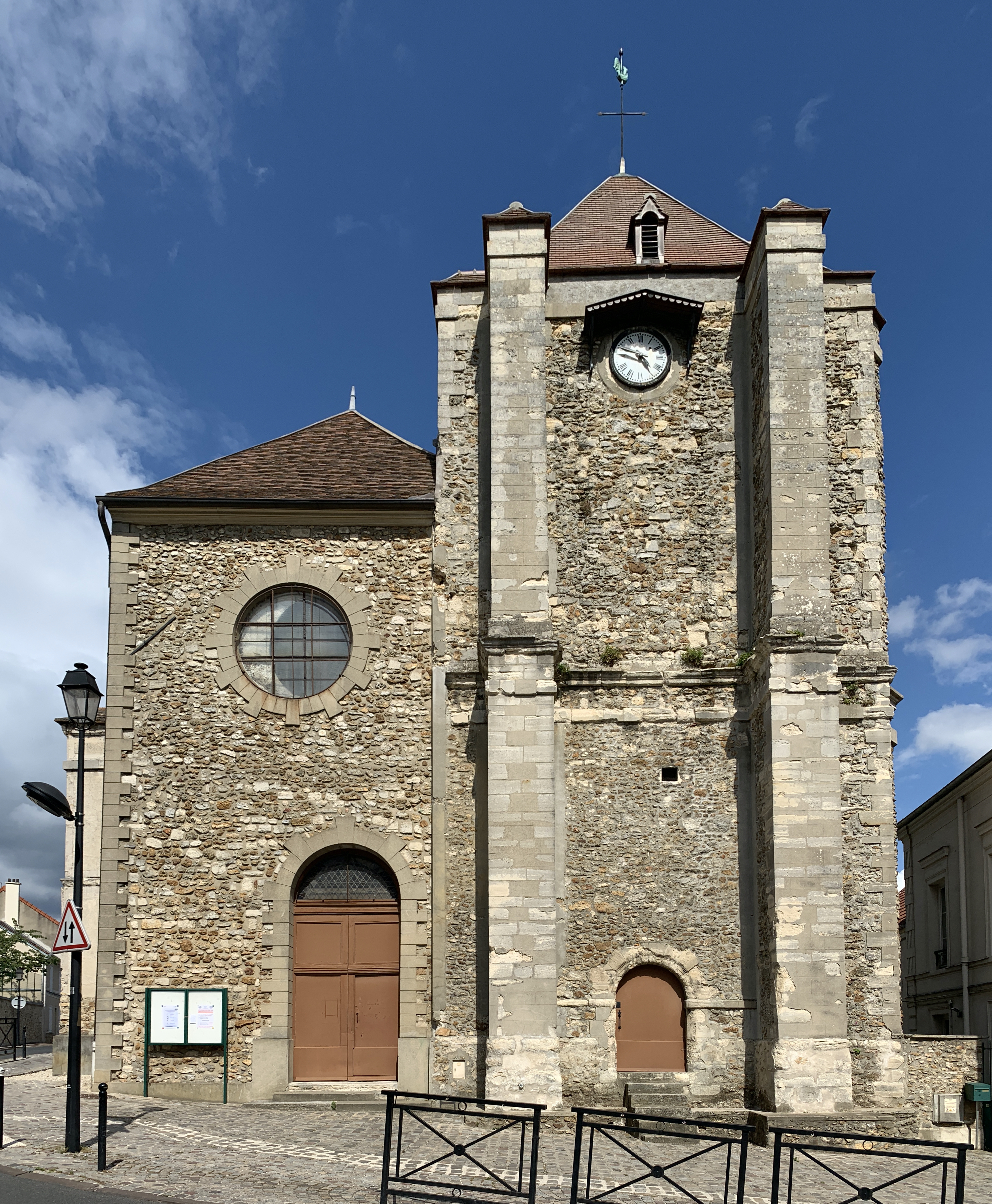 Église Saint-Nicolas de La Queue-en-Brie.